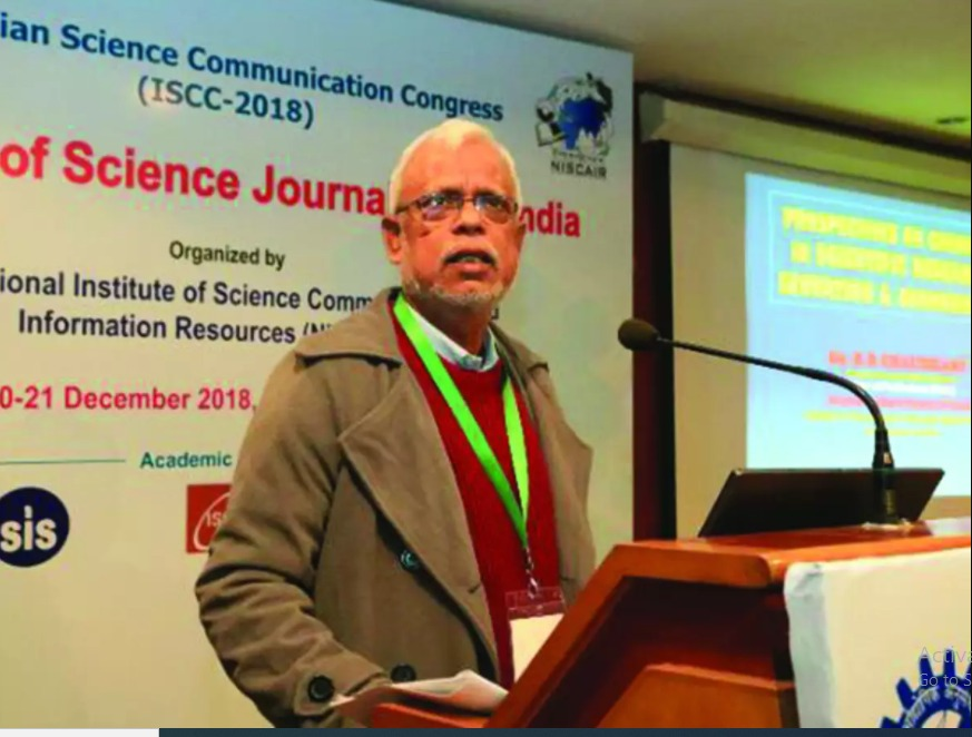 सीएसआईआर के तत्वावधान में डॉ. आर. बी. चौधरी इंडियन साइंस कम्युनिकेशन कांग्रेस, 2018, नई दिल्ली में पेपर प्रस्तुत करते हुए